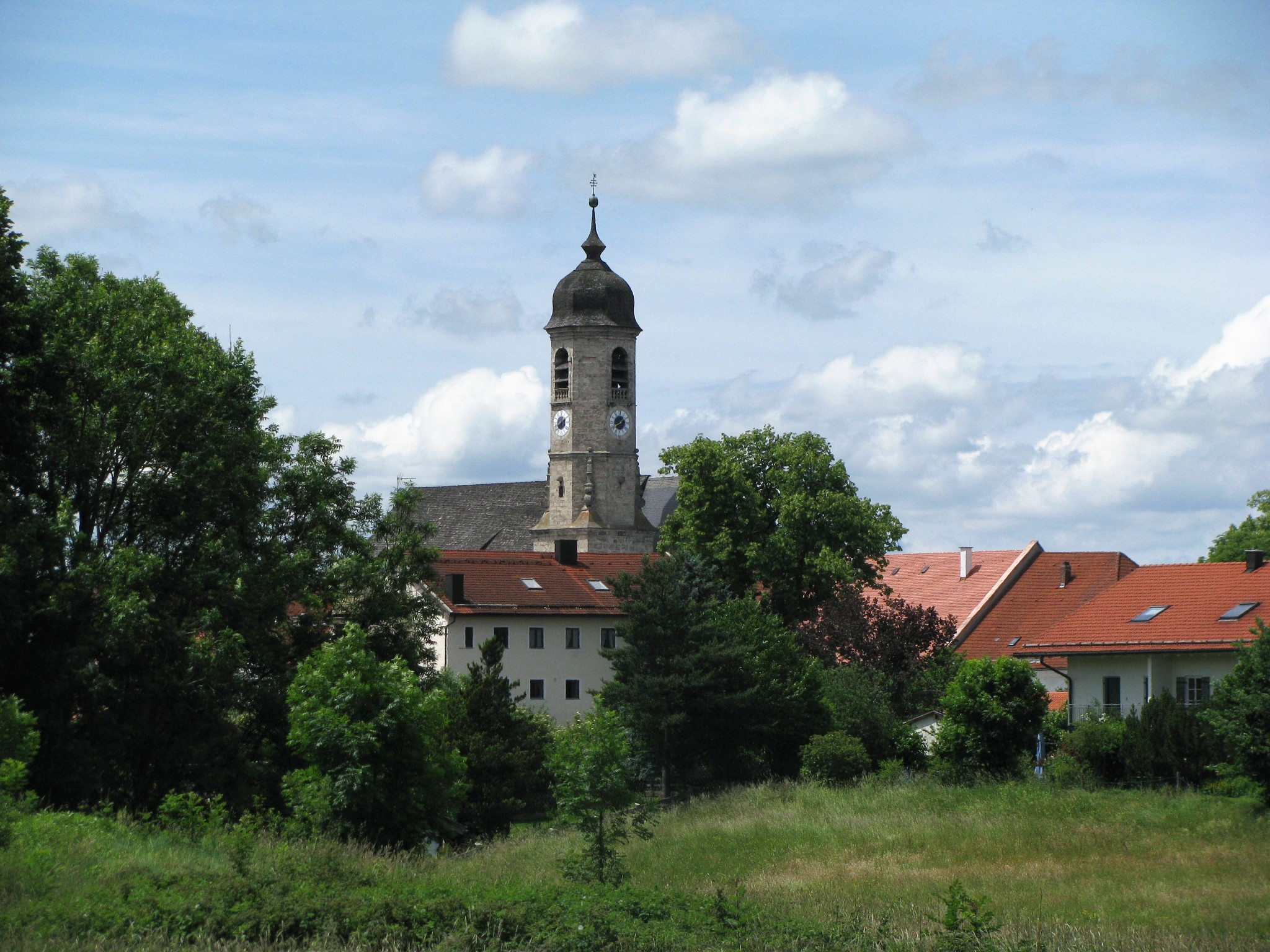 Ansicht der Weyarner Kirche St. Peter und Paul aus Ostsüdost